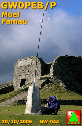 GW0PEB/P - ar gopa Moel Famau - rhaglen Copaon yr Awyr (SOTA)